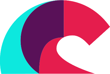 Símbolo de Convergencia Social, partido político de Chile.